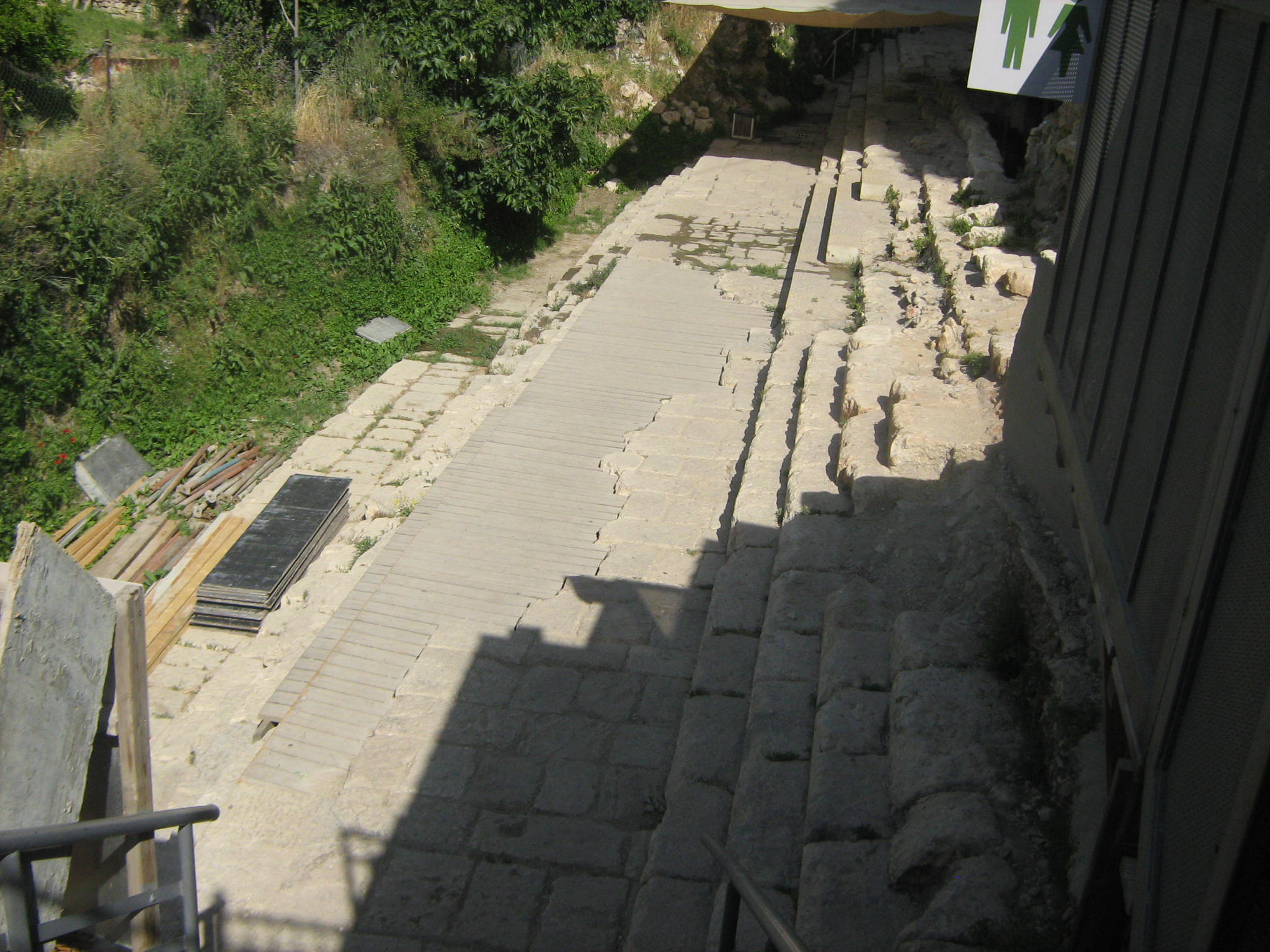 Город Давида-бассейн Шилоах